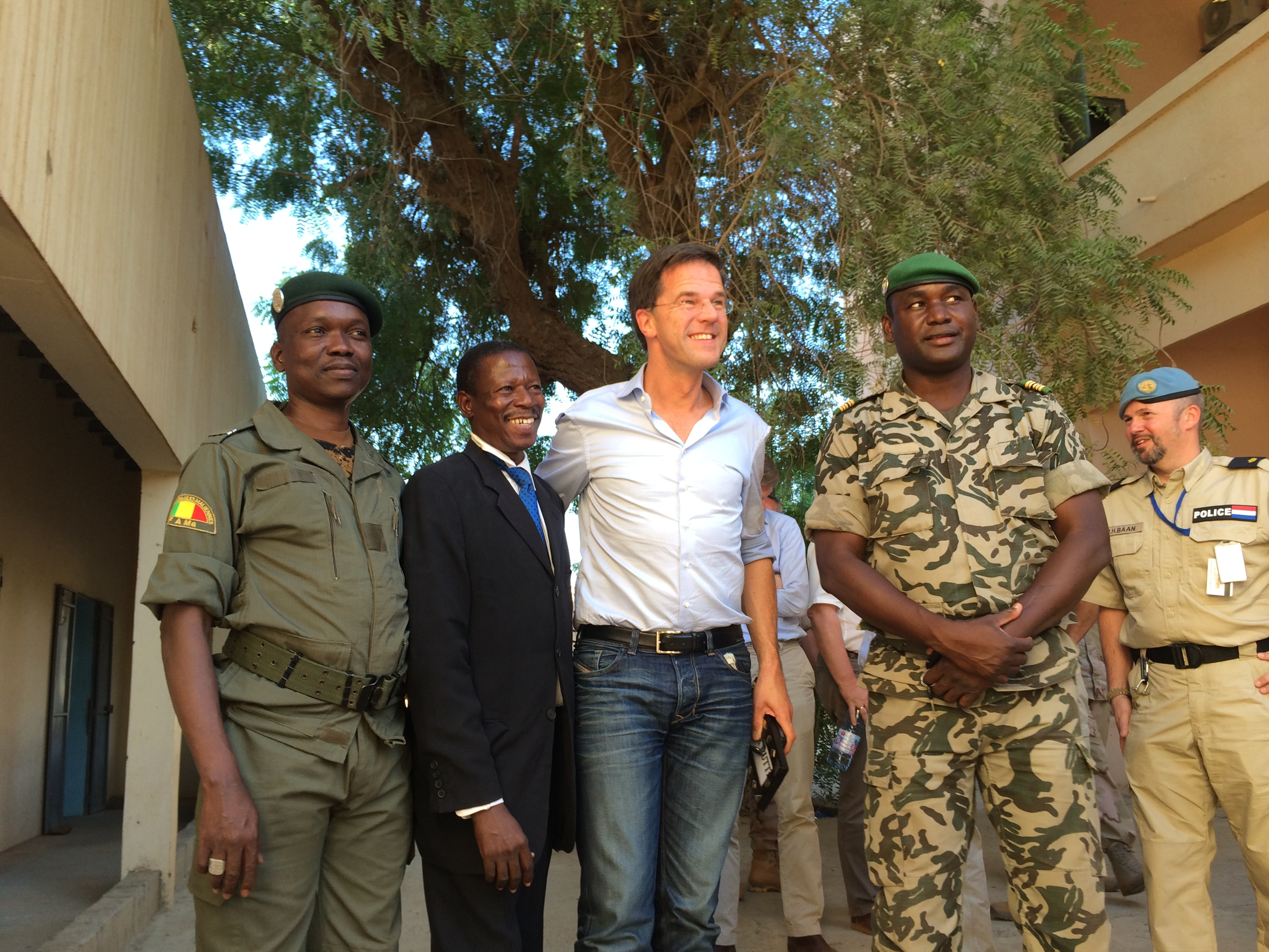 Fotostream Ministerpresident Mark Rutte